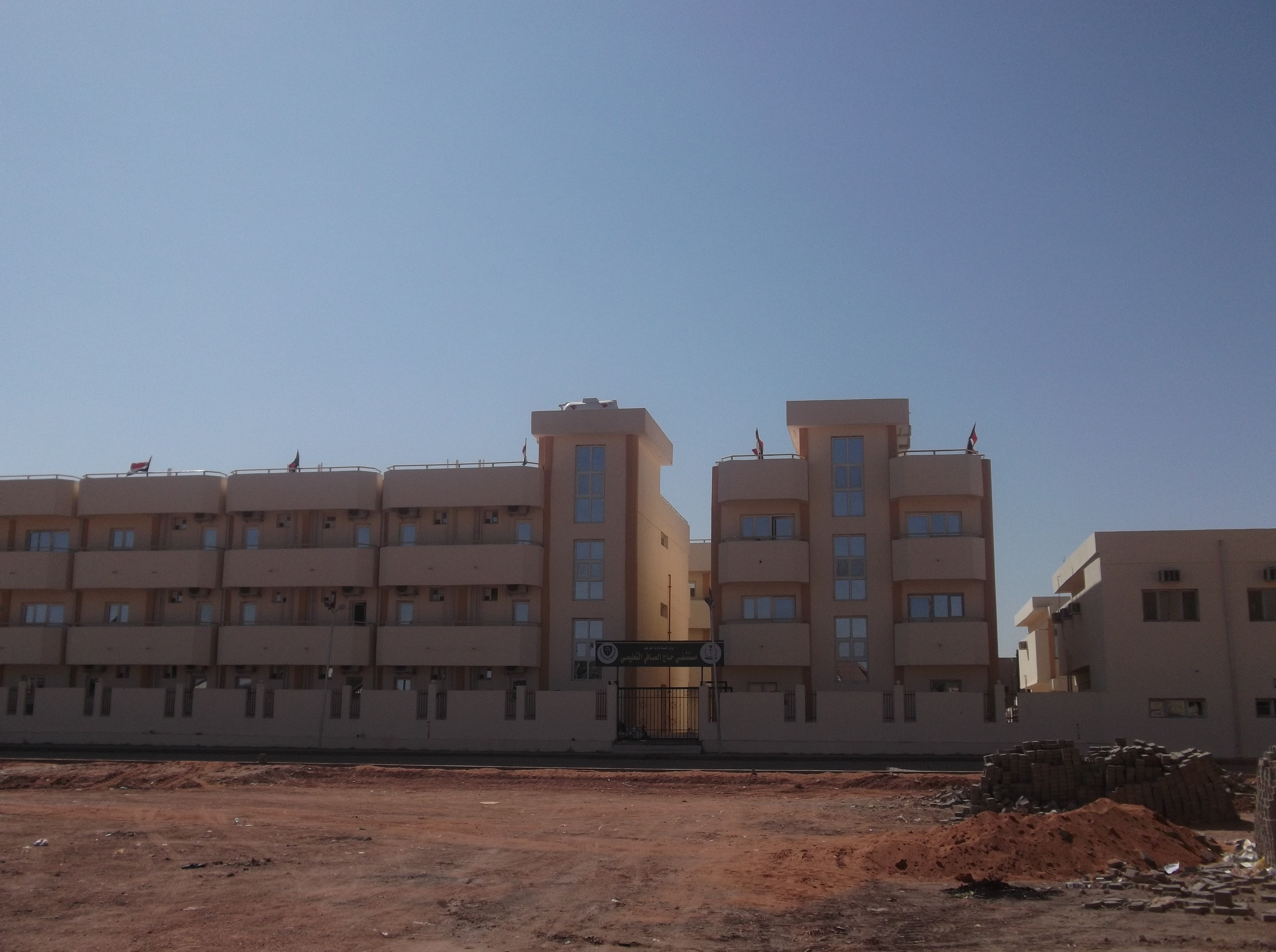 مستشفى حاج الصافي - خرطوم بحري- سودان